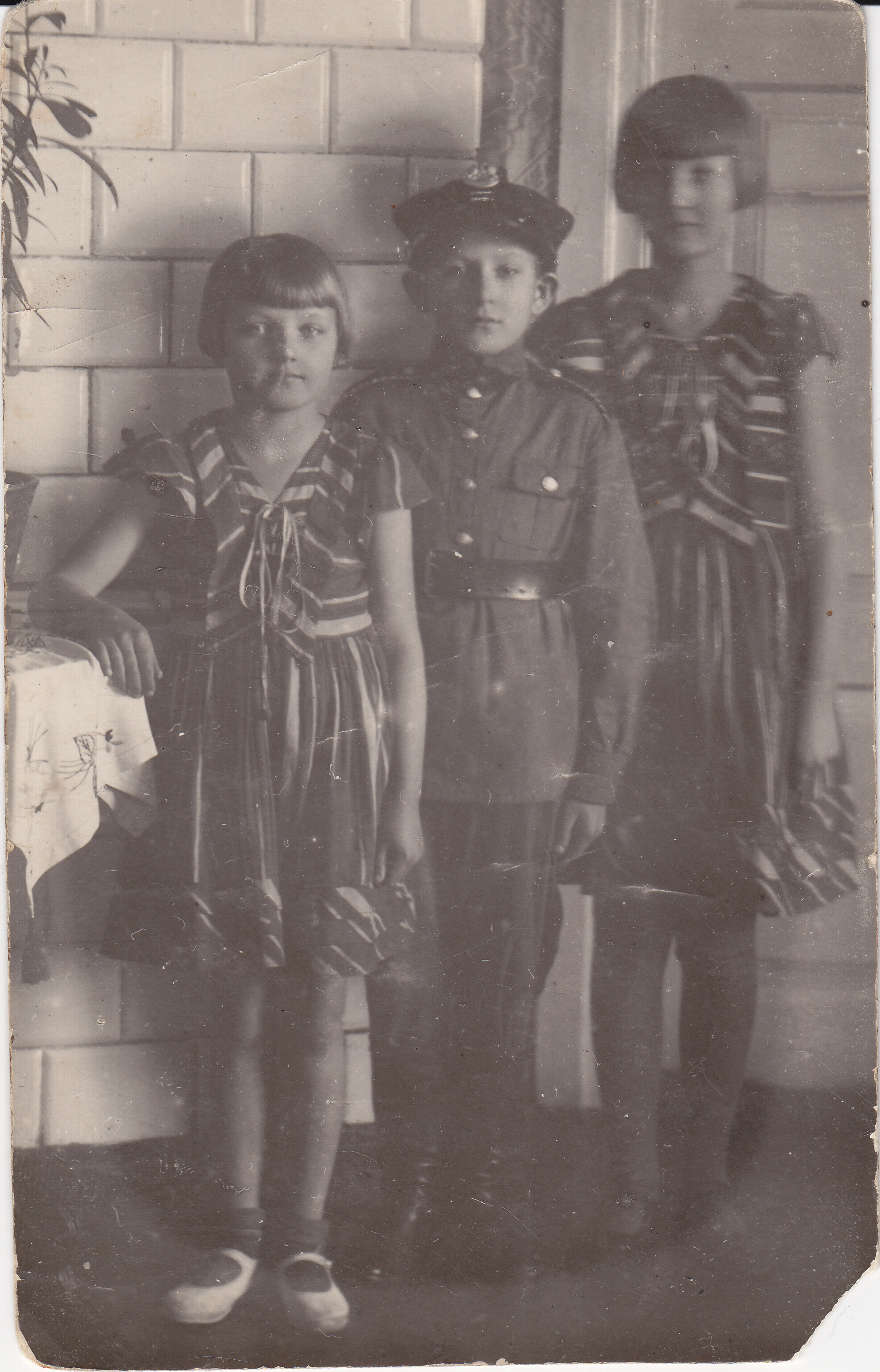 Walerian Przeniczka z siostrami Pelagią i Sabiną